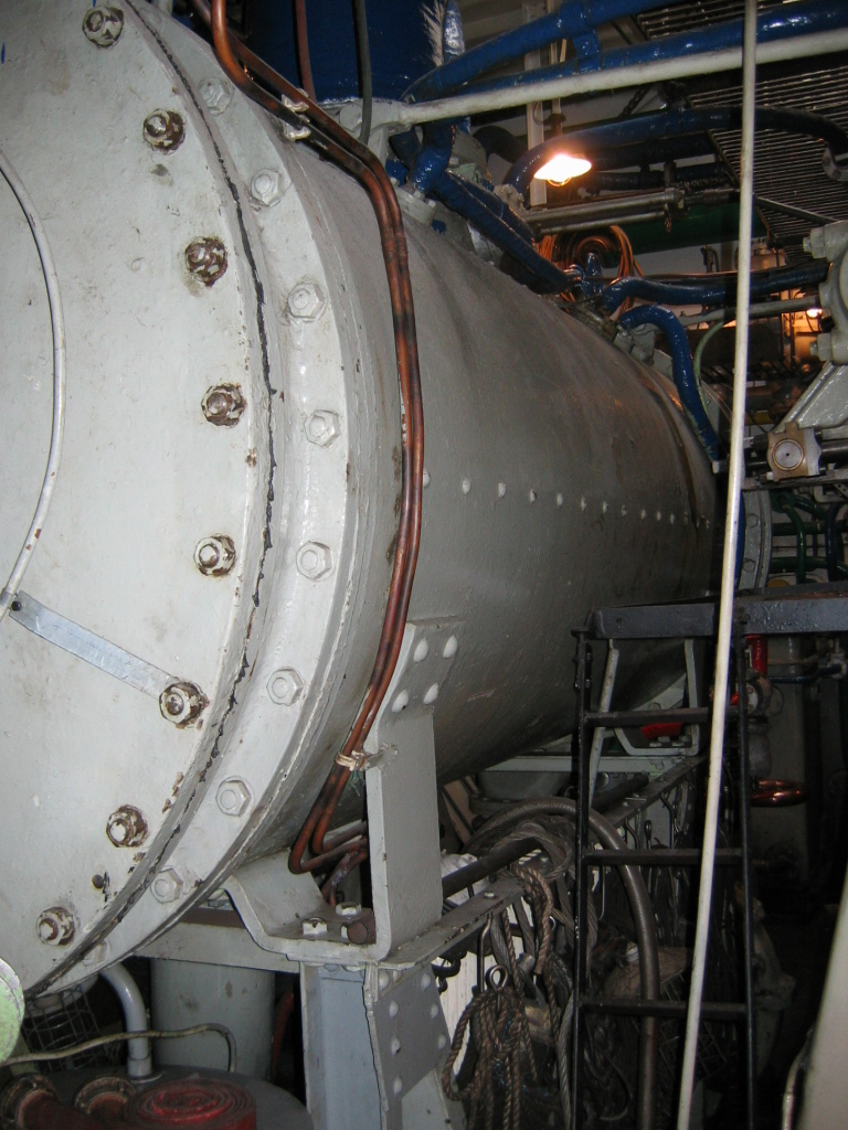 Kondesator pary, parowiec "Stettin"